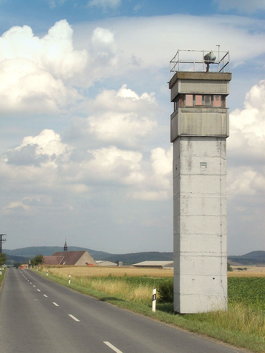 Ehemaliger Grenzturm der deutsch-deutschen Grenze bei Berkach (Thüringen)